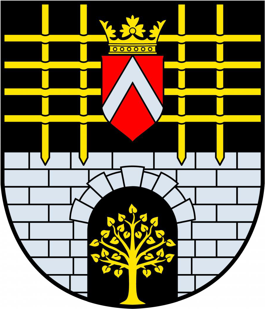 Die Verleihung des Gemeindewappens erfolgte mit Wirkung vom 10. Februar 2016.